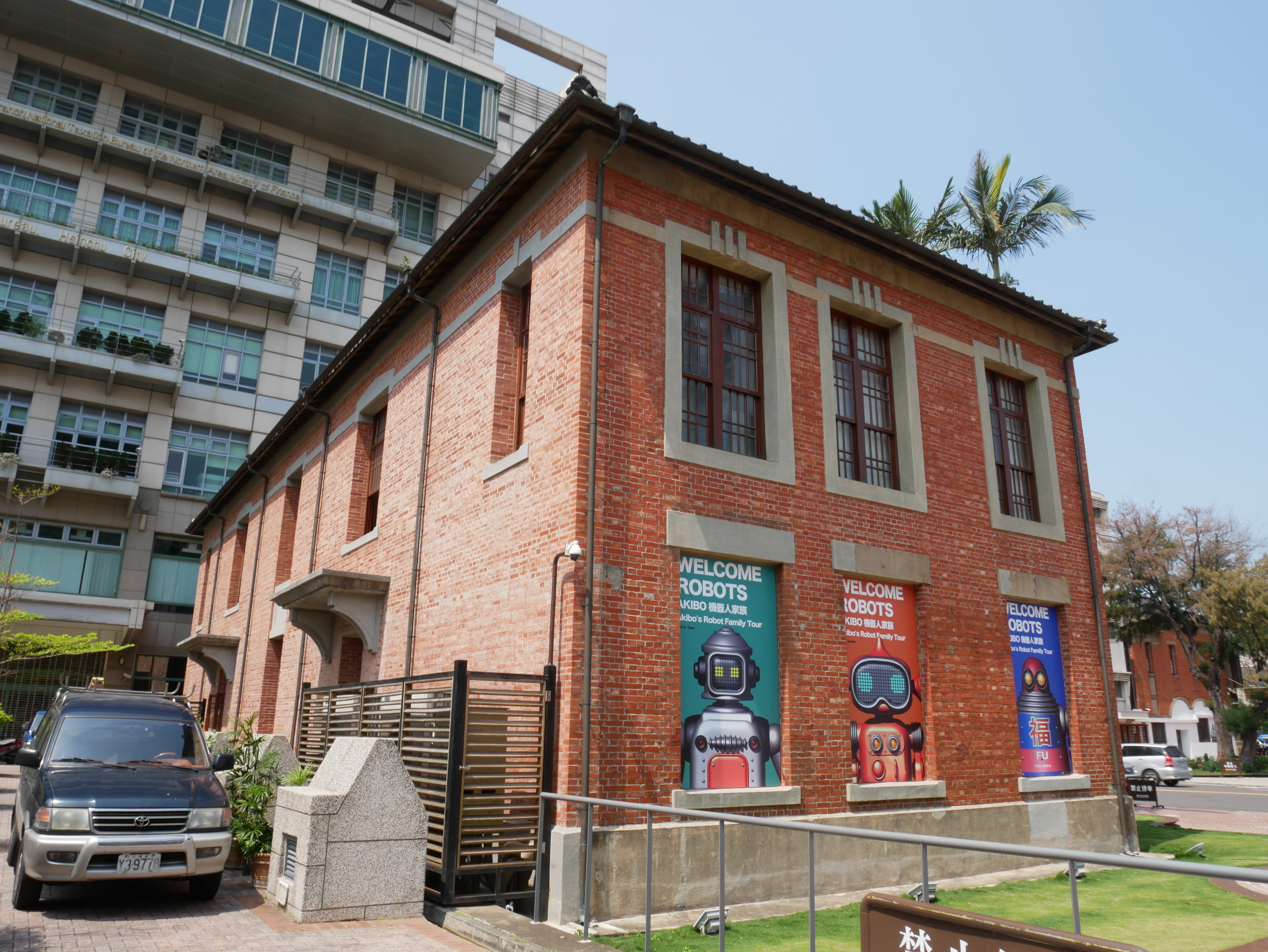 中文（台灣）: 新竹市役所後側，新竹市東區東門聯里中正里